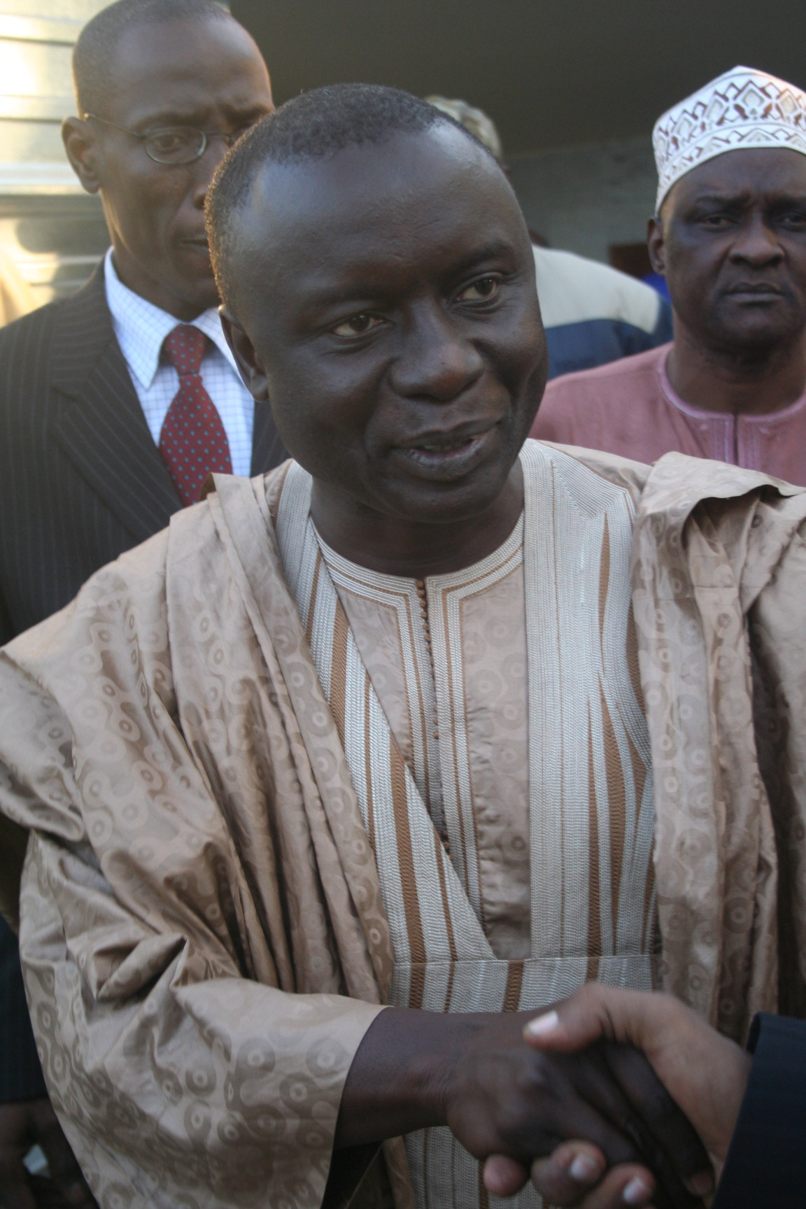 Ancien Premier ministre senegalais , ancien maire de thies et president du parti rewmi